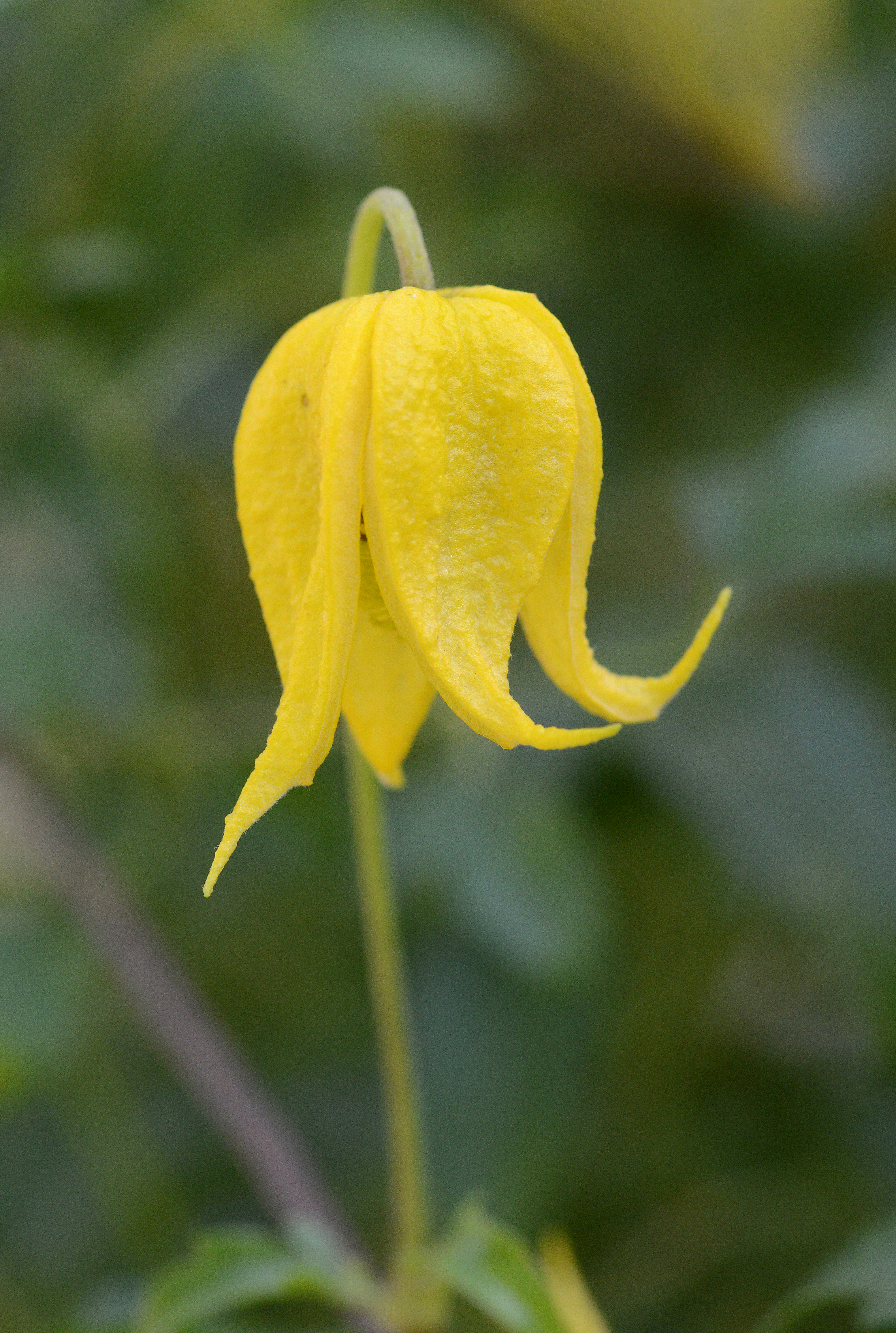 Clematis tangutica; Mongolei, China